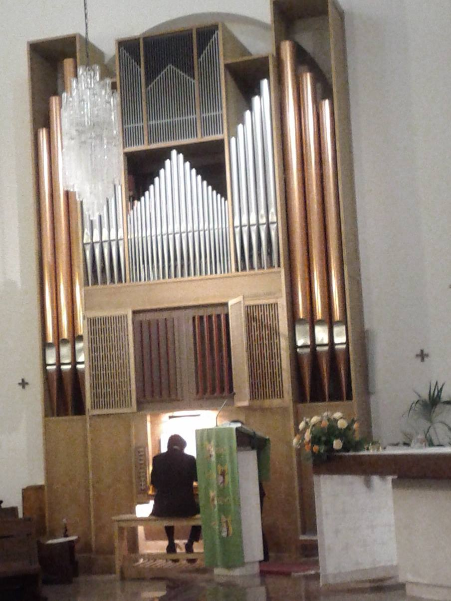 Organo Franz Zanin di San Gottardo, Ottobre 2013